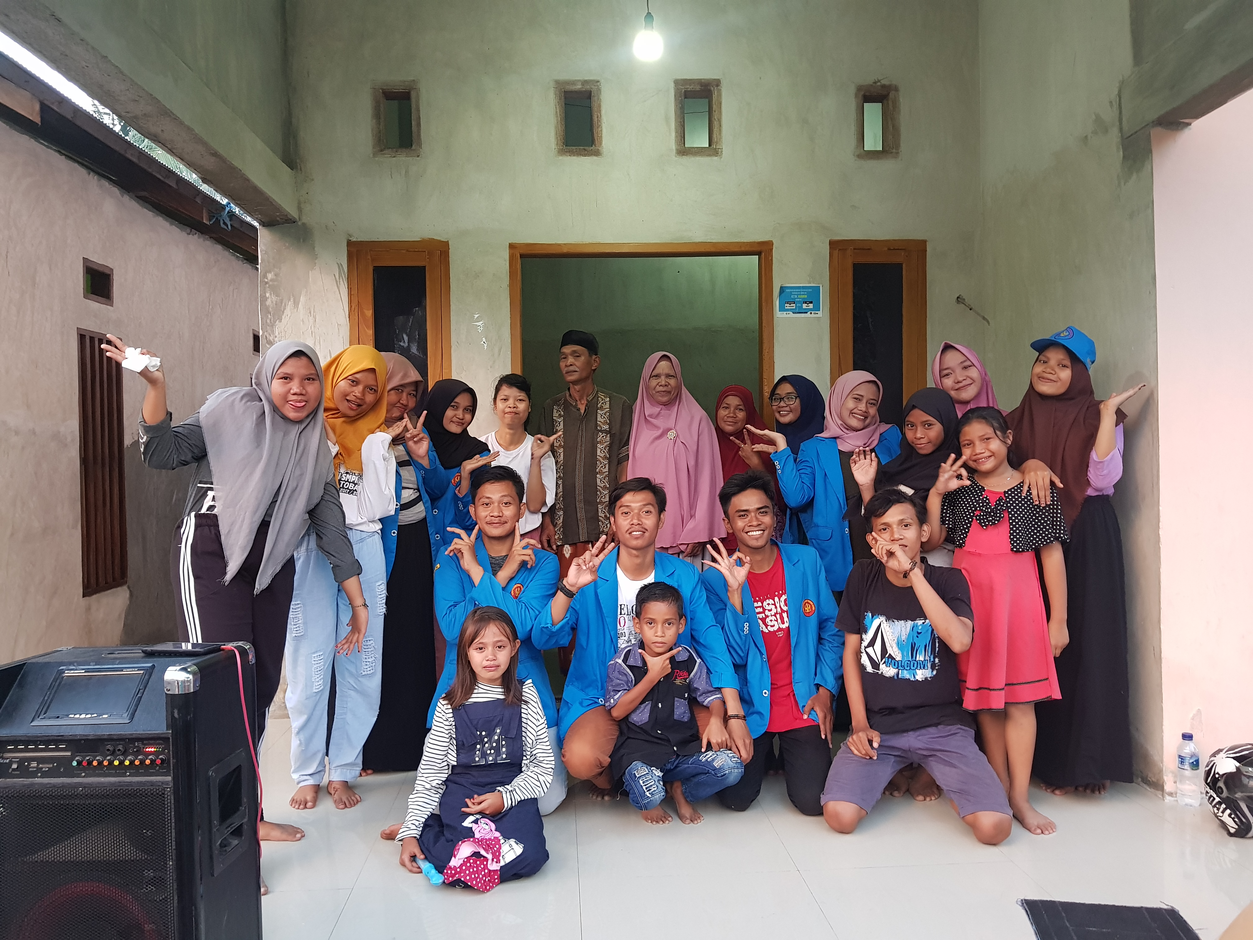 Keluarga di Desa Oti